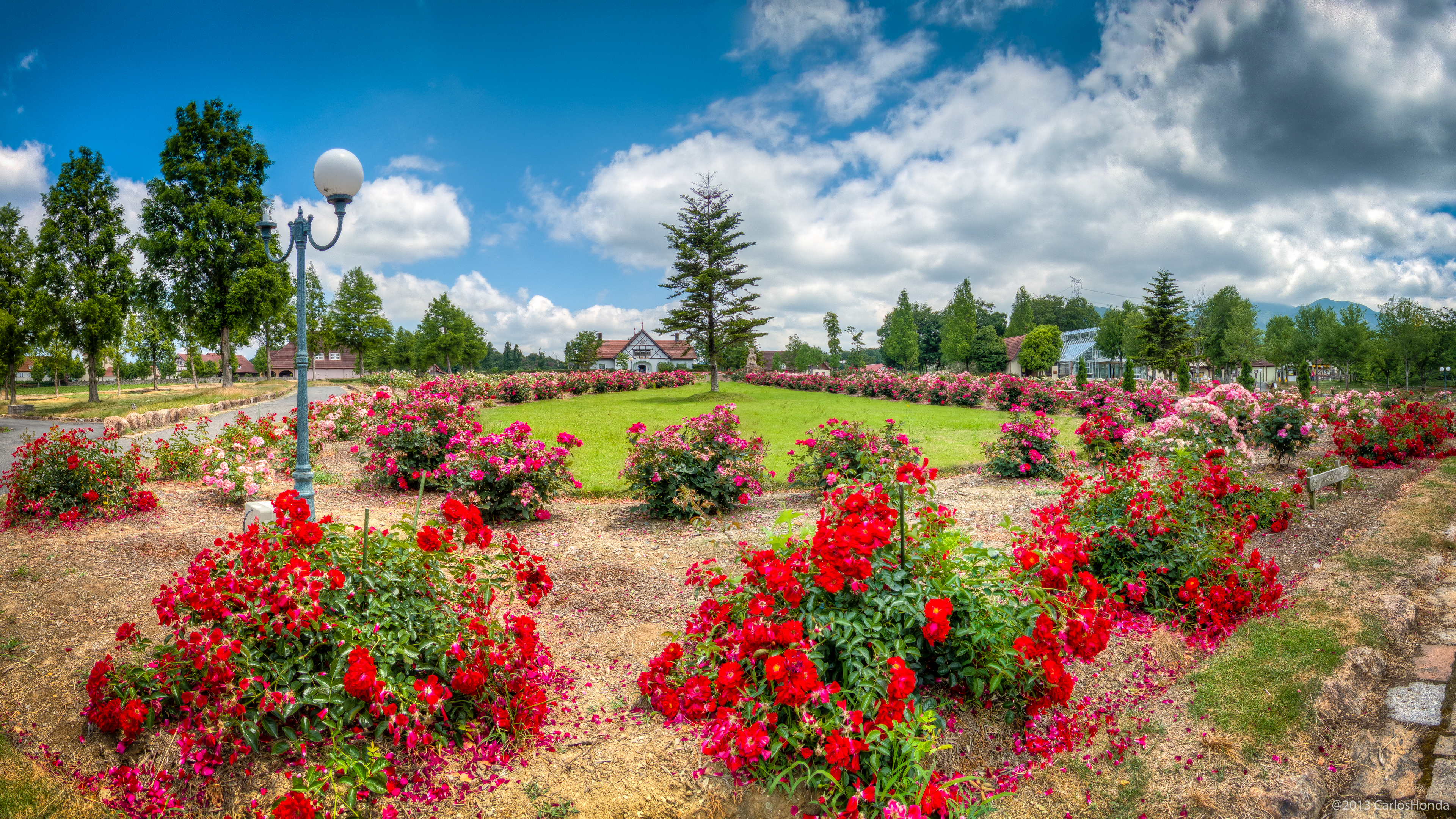 Blumen Hugel, Nishioji, Hino-cho, Shiga-ken, ブルーメの丘